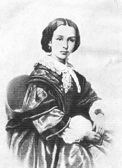 Шуберт А.И. (1827 - 1909 ) - русская актриса